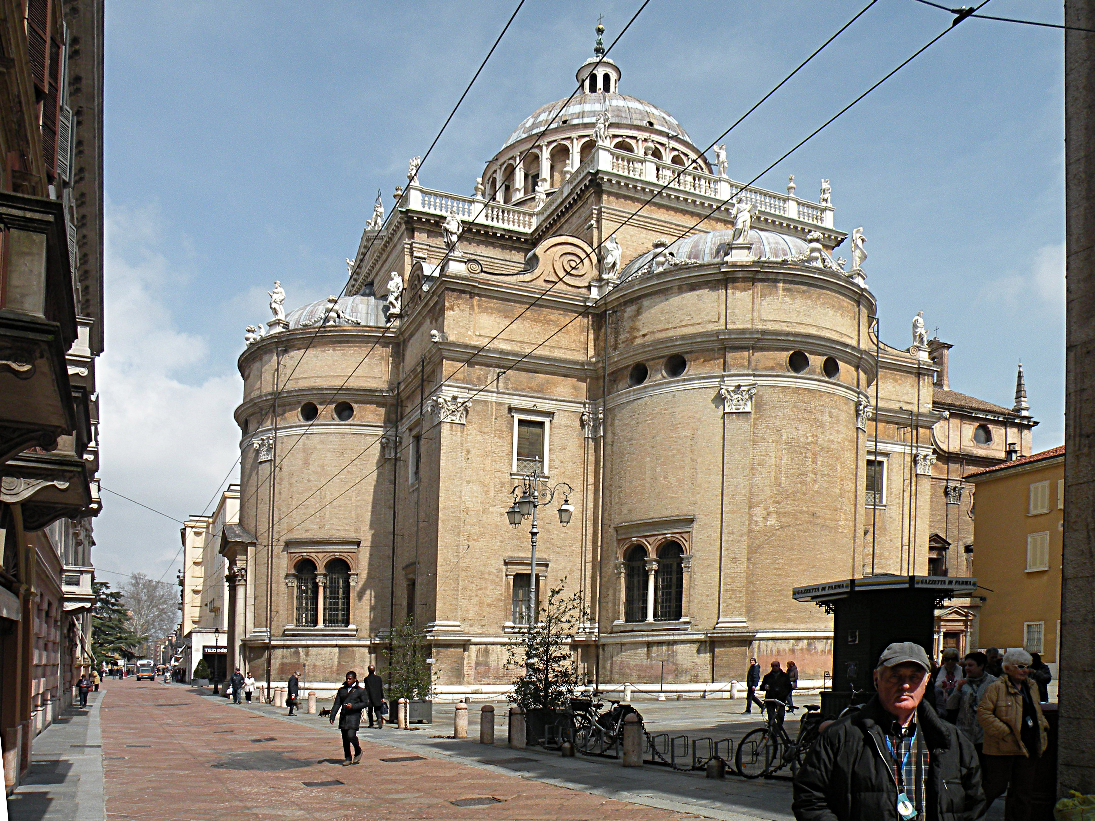 Церковь Богоматери в Парме